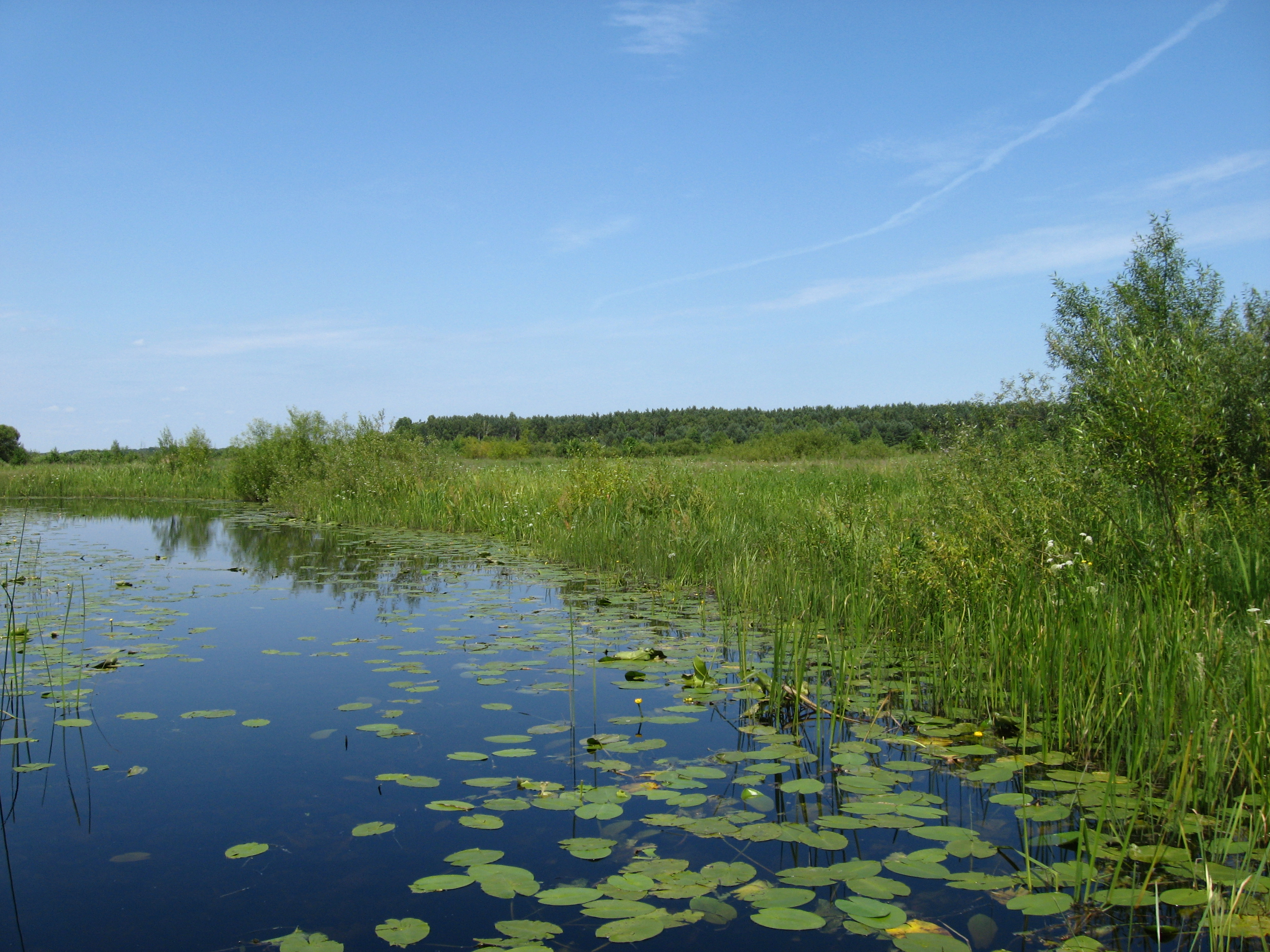 Національний природний парк «Прип'ять-Стохід»